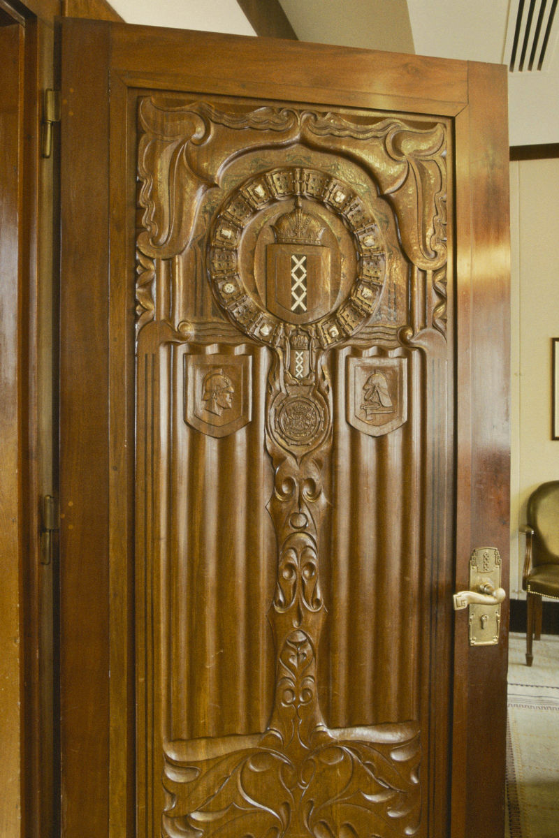 Voormalig Raadhuis: Interieur, detail van houten deur met onder andere het wapen van Amsterdam